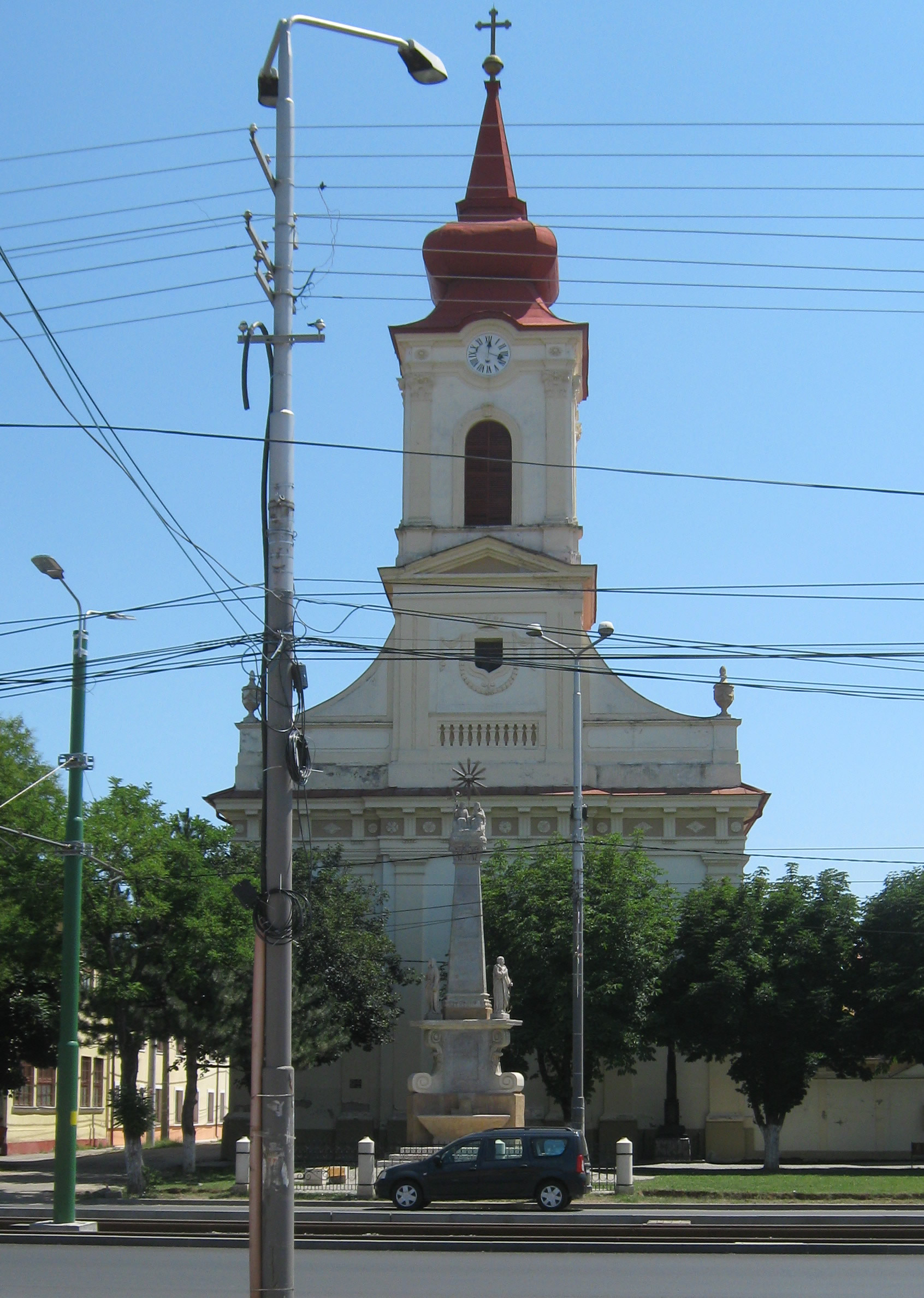 Das Foto zeigt die Kirche von Neu-Arad (Aradul Nou) im Juni 2012